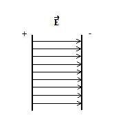 Направление линий в однородном поле.